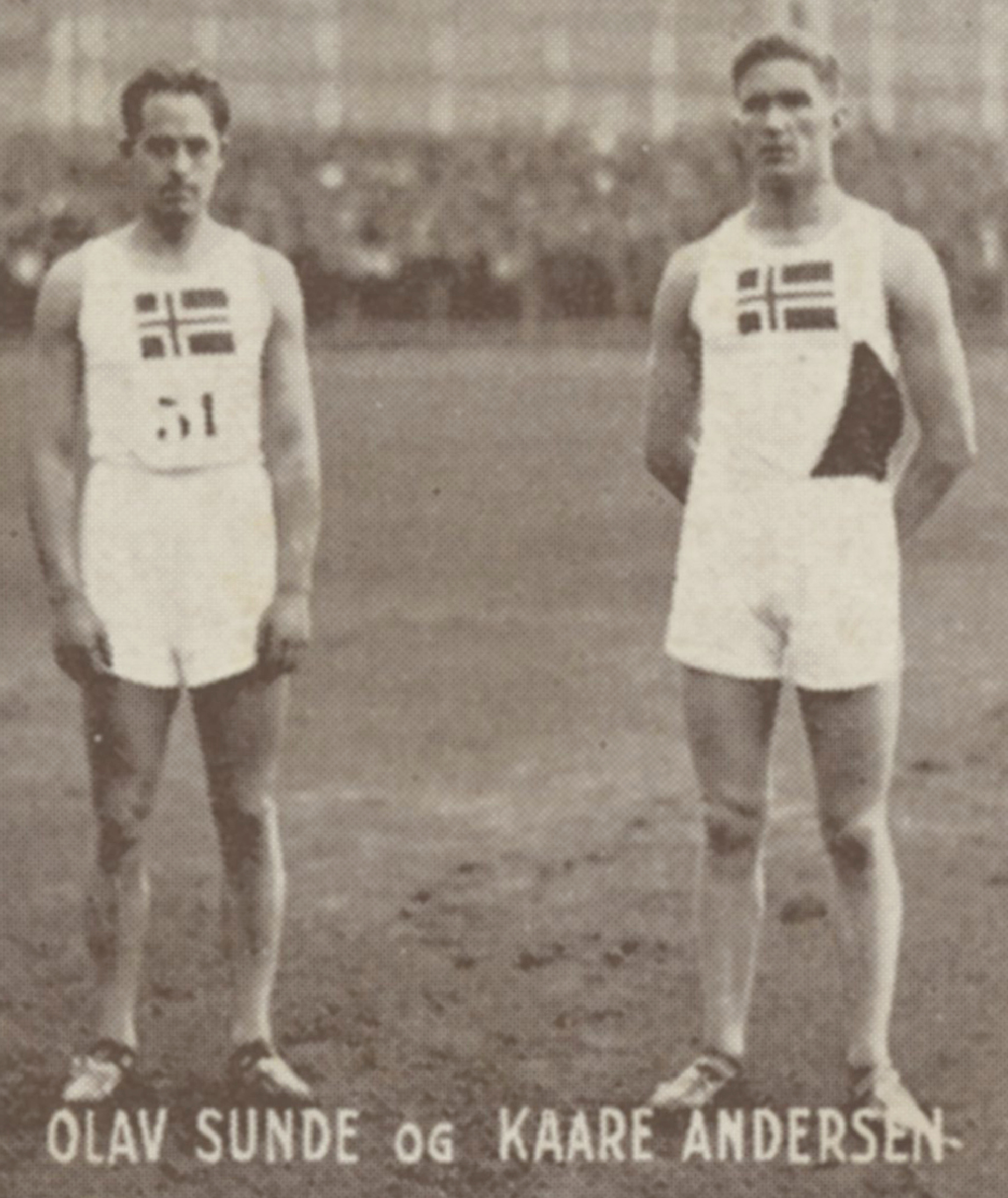 Format: Samlekort Dato / Date: ca. 1930 (dokumentet) Fotograf / Photographer: Ukjent Wikipedia: Olav Sunde (1903 - 1985) Eier / Owner Institution: Trondheim byarkiv, The Municipal Archives of Trondheim Arkivreferanse / Archive reference: Sportsklubben Freidig: Sigarettfoto ca. 1930 (Løpenr. 75) F23960 Tekst på baksiden: Olav Sunde og Kaare Andersen, Norge, vant som bekjent spydkast ved landskampen 1930 på Bislet. Sunde vant over såvel Forsman samt Lindström, Sverige, med et kast på 64 meter. Andersen vant juniorkampen med 57.49. Spydkastduellen var meget spennende og en av landskampens lyspunkter for de norske farver. Merknad: Disse samlekortene med bilder av norske og internasjonale idretthelter fulgte med i sigarettpakker på 1920 og 30-tallet - derav tobakksreklamen på baksiden. Samlekortene kommer fra Sportsklubben Freidigs arkiv, og inneholder nærmere 90 unike kort pent plassert i et samlealbum. Samleren var den senere skipsmegler Finn Følling (1914 – 1985).